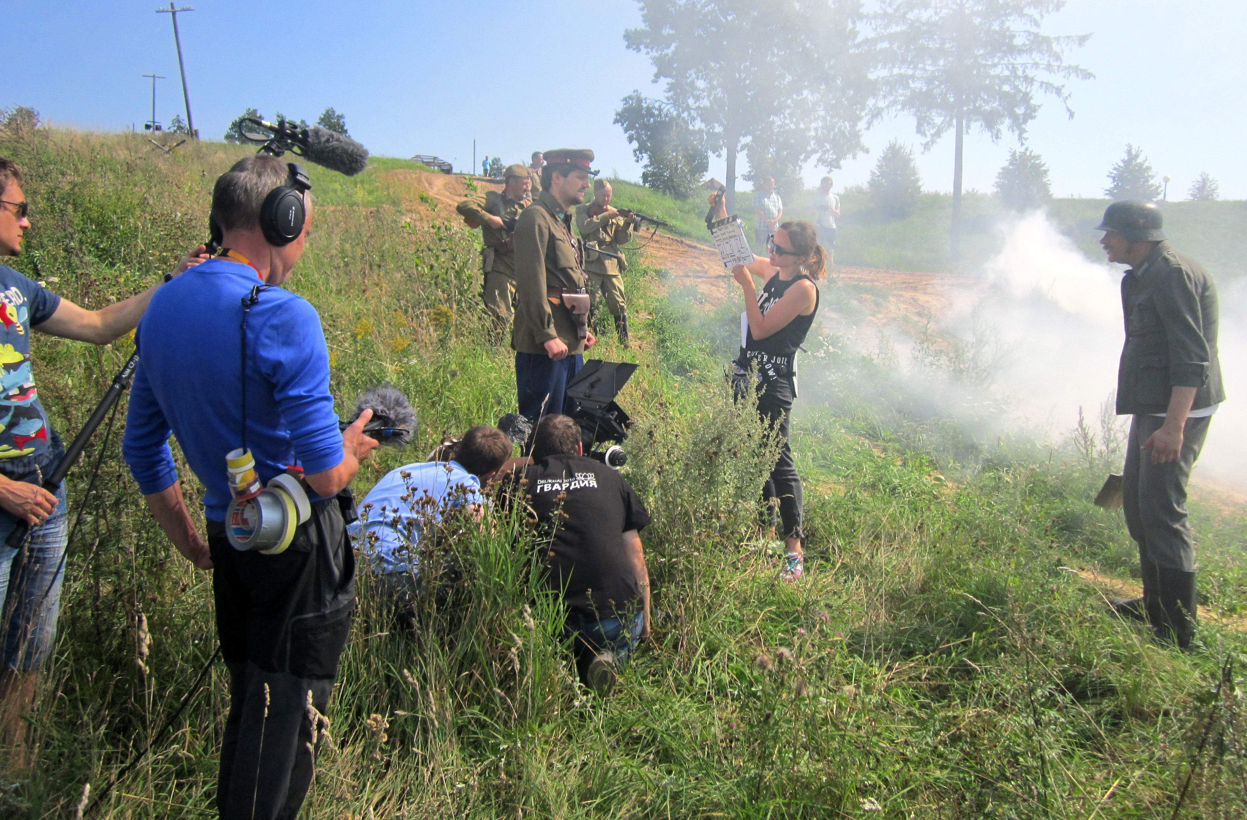 Съёмки фильма «PARTY-zan фильм». "Линия Сталина", Минский район.